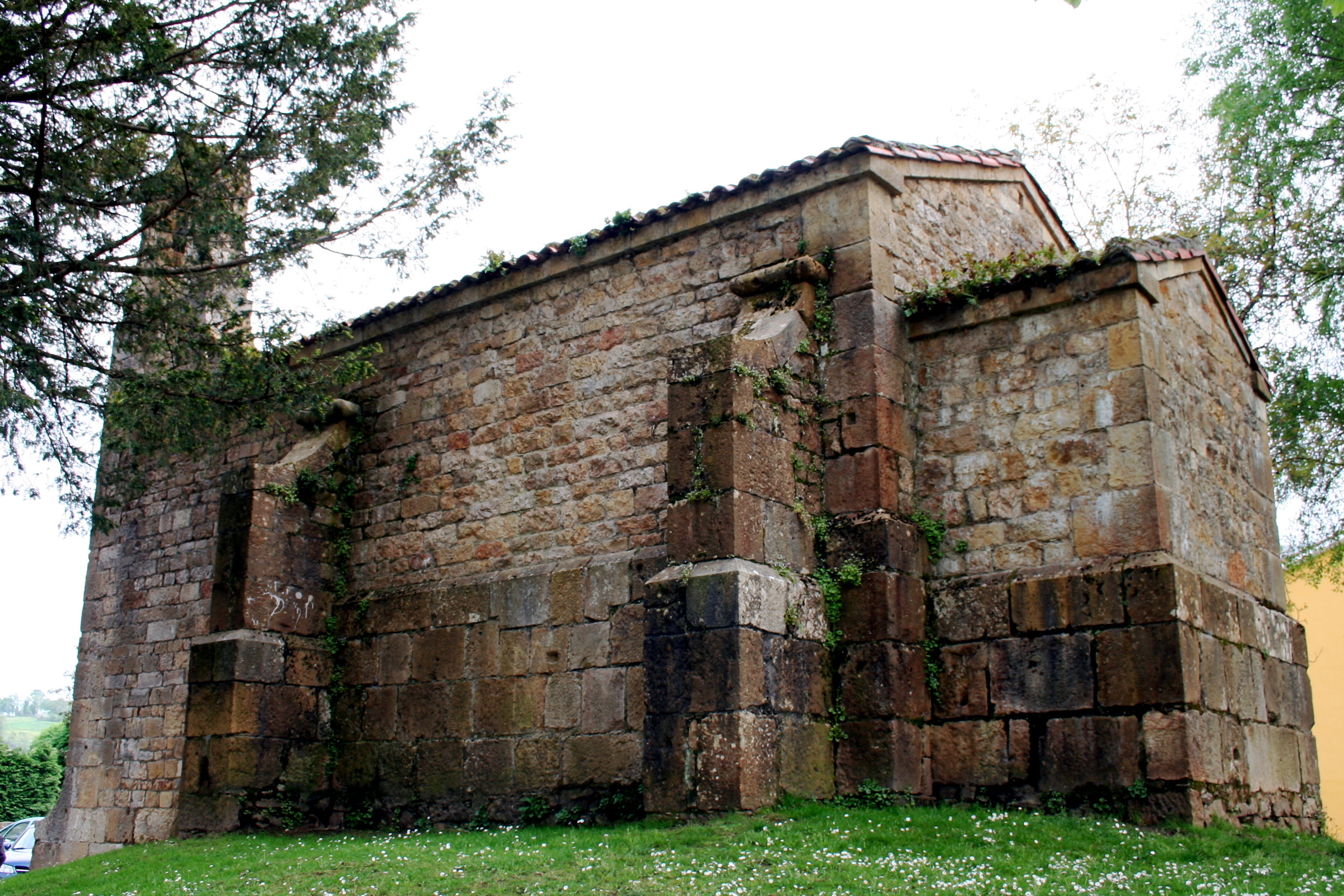 Lateral derecho de la iglesia de la Santa Cruz de Cangas de Onís